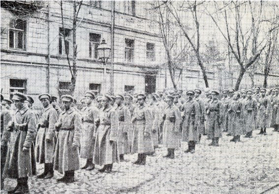 Січові Стрільці: 1-ша Сотня Січових Стрільців у Києві під час усунення заколотників "Арсеналу"